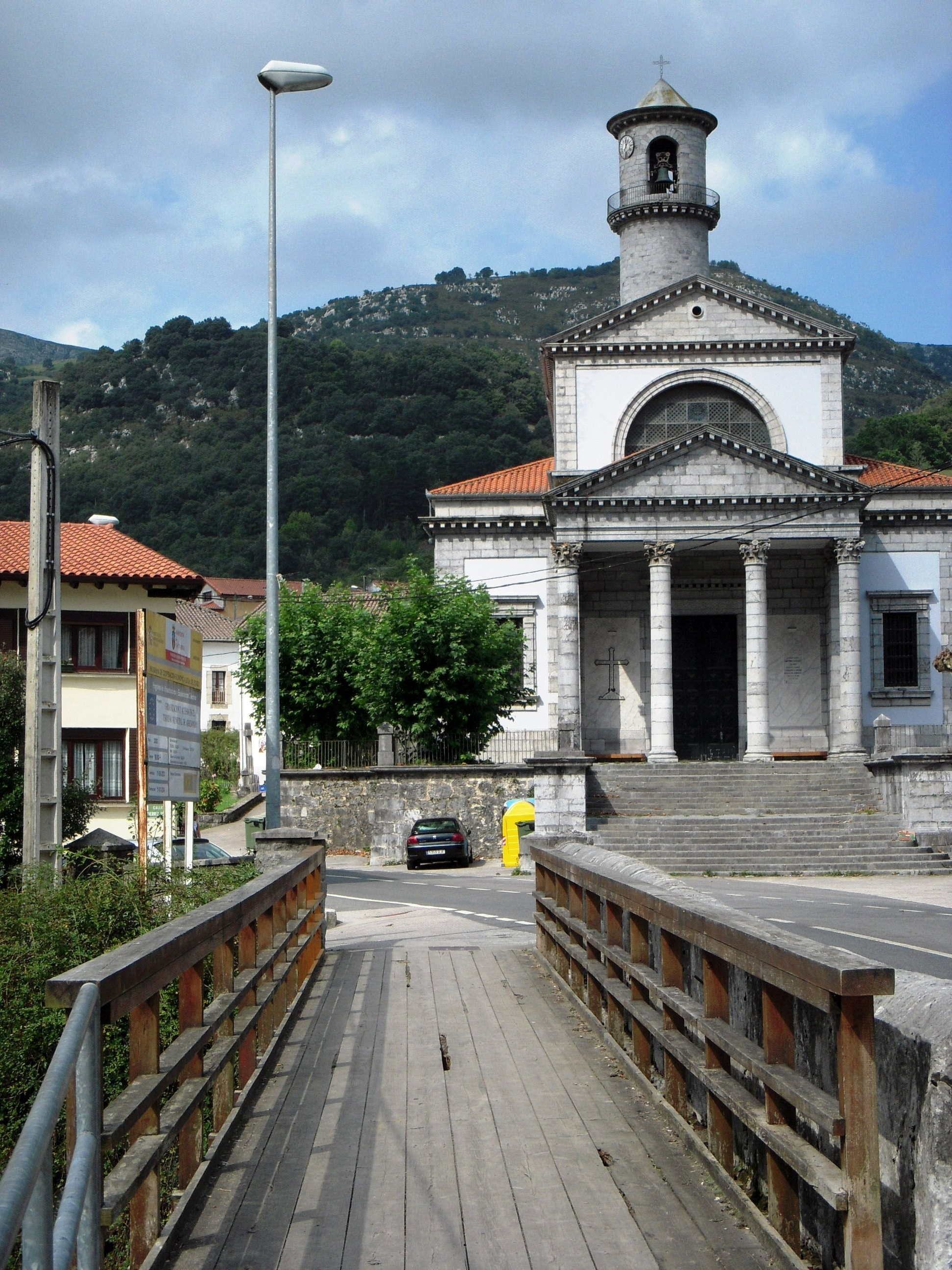 Iglesia de estilo neoclásico en Arredondo